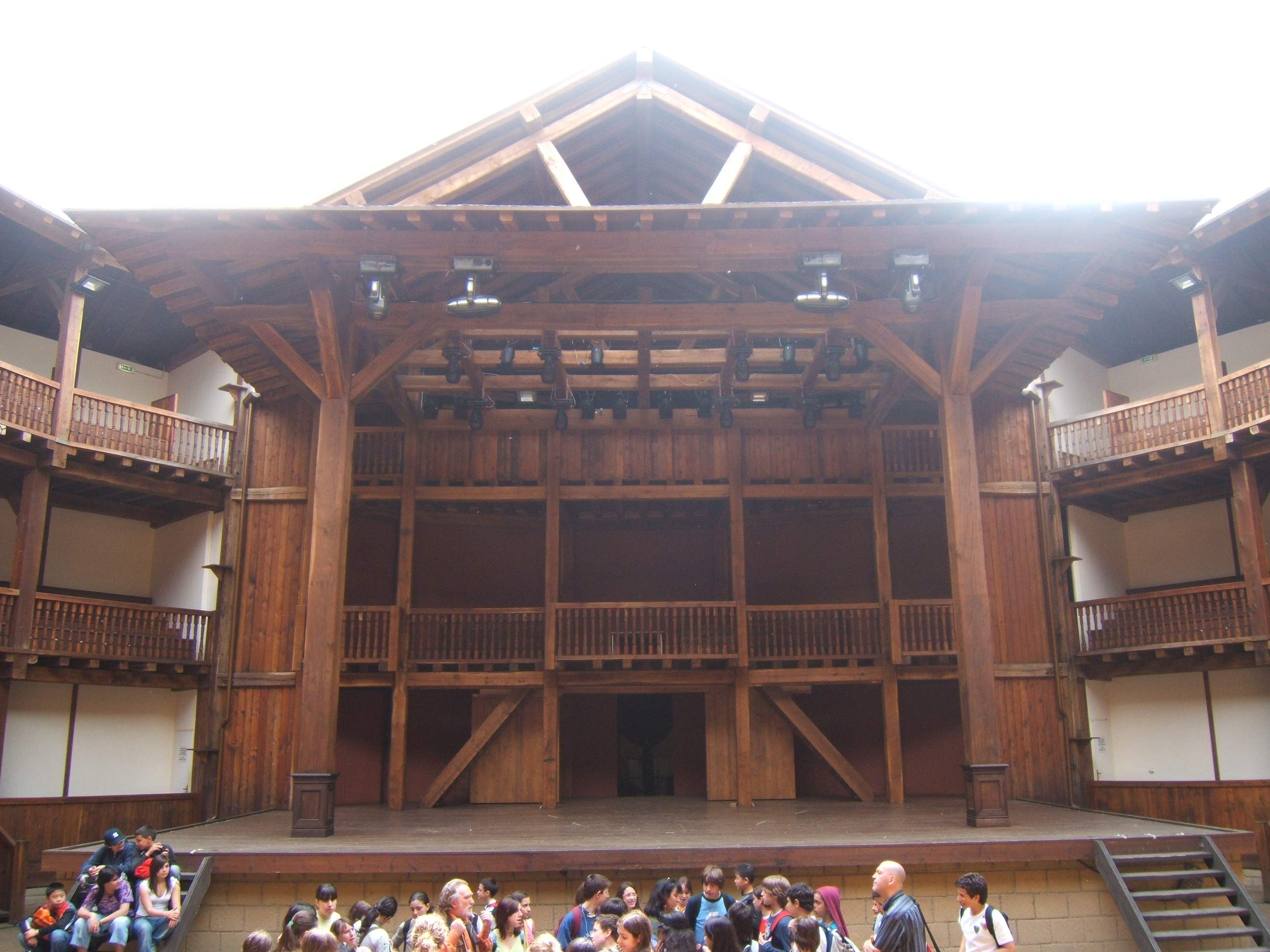 Palcoscenico del Teatro elisabettiano ricostruito fedelmente a Roma a Villa Borghese